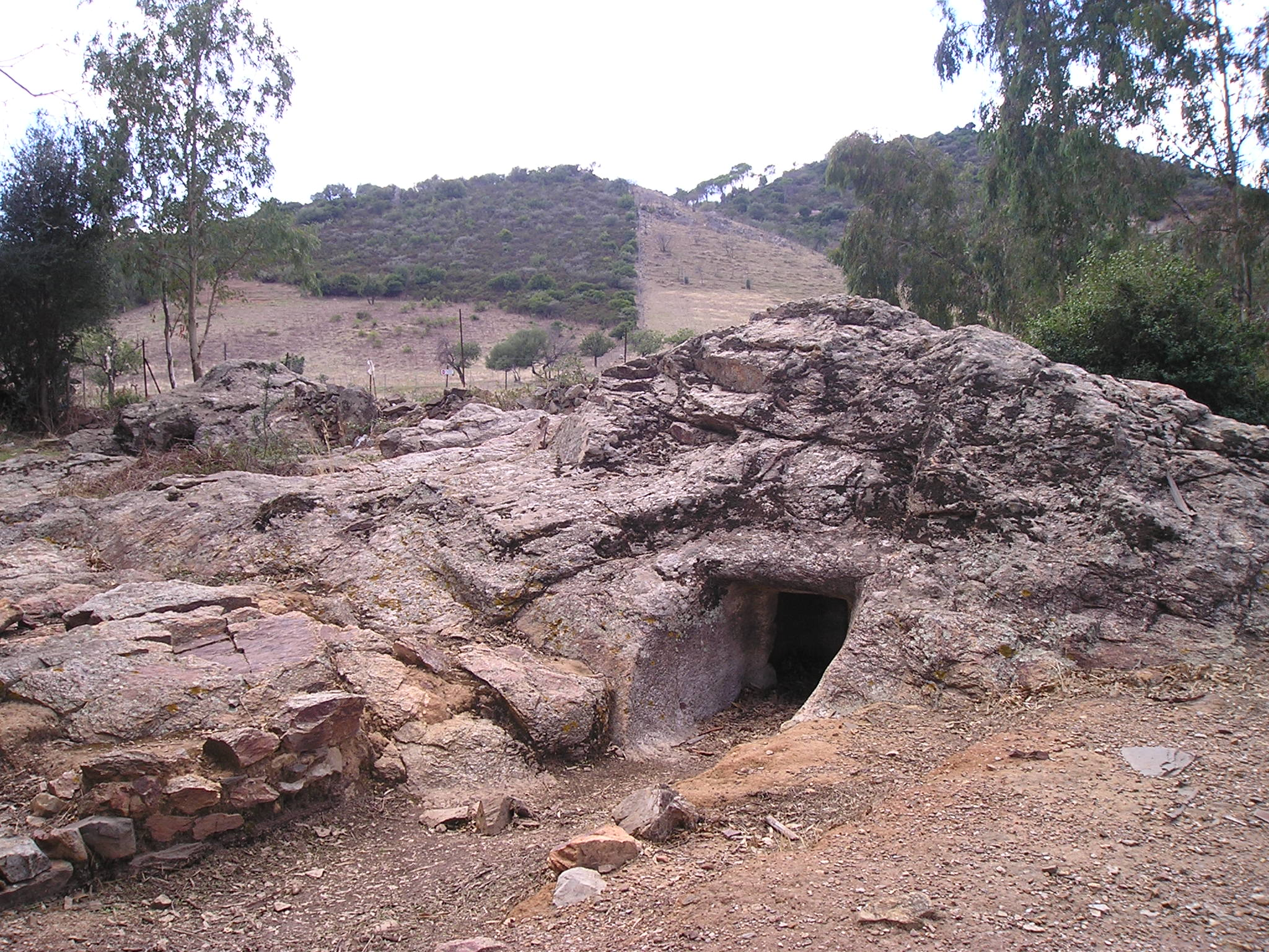 Foto da me realizzata della Domus de Janas di Castiadas